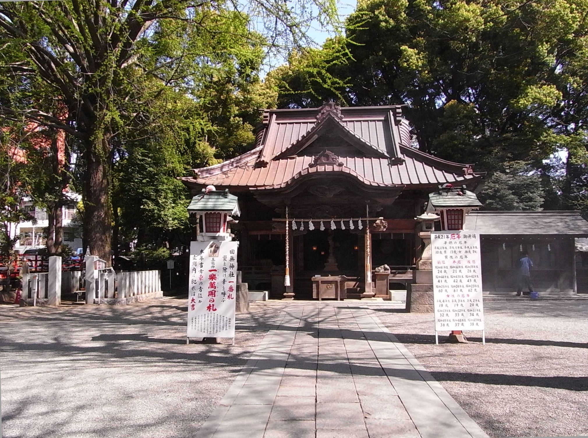 西東京市 田無神社